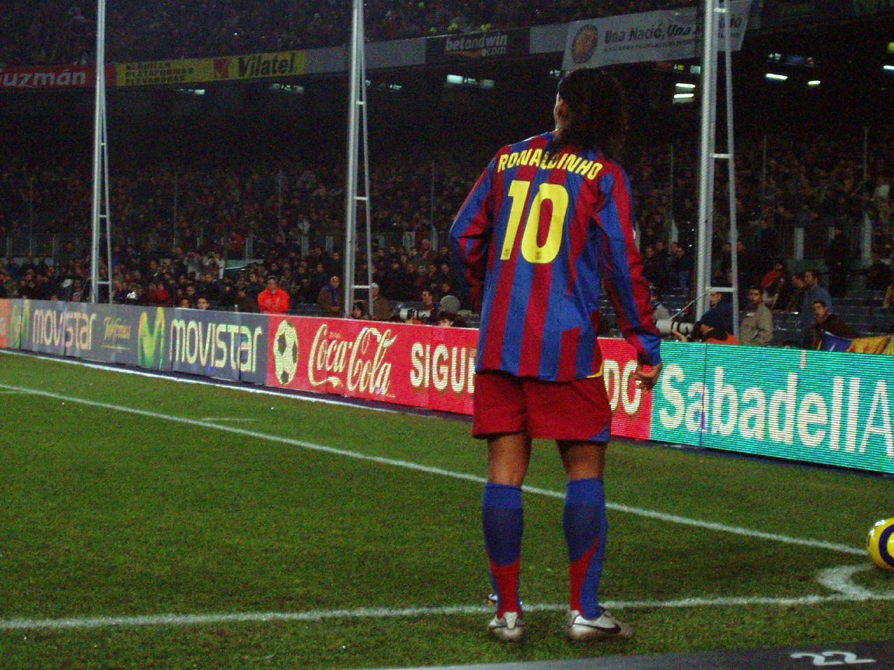 Camp Nou, F.C Barcelona vs Celta de Vigo. Final score: 2 - 0